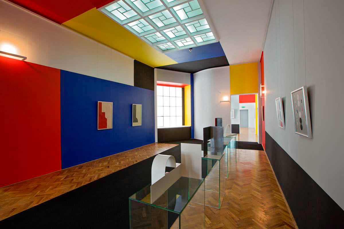 Sala Neoplastyczna ms1